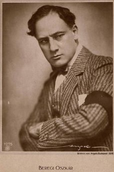 Beregi Oszkár (1876-1965) 42 eves korában